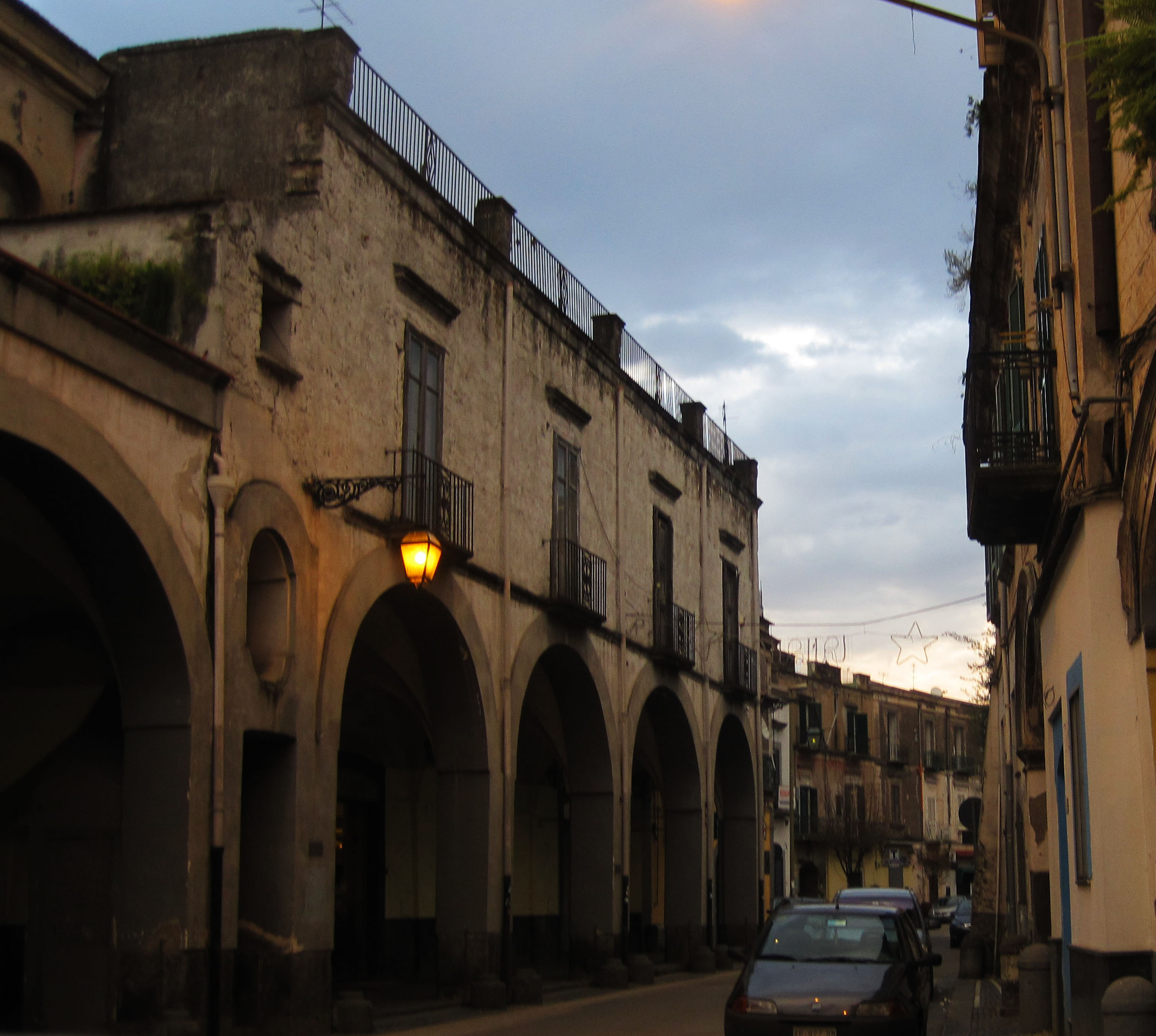 Foto scattata da me, nel mio paese Pomigliano D'Arco.